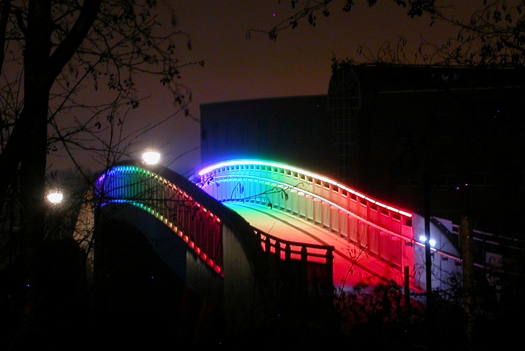 Die Dortmunder Regenbogenbrücke in der Schrägansicht